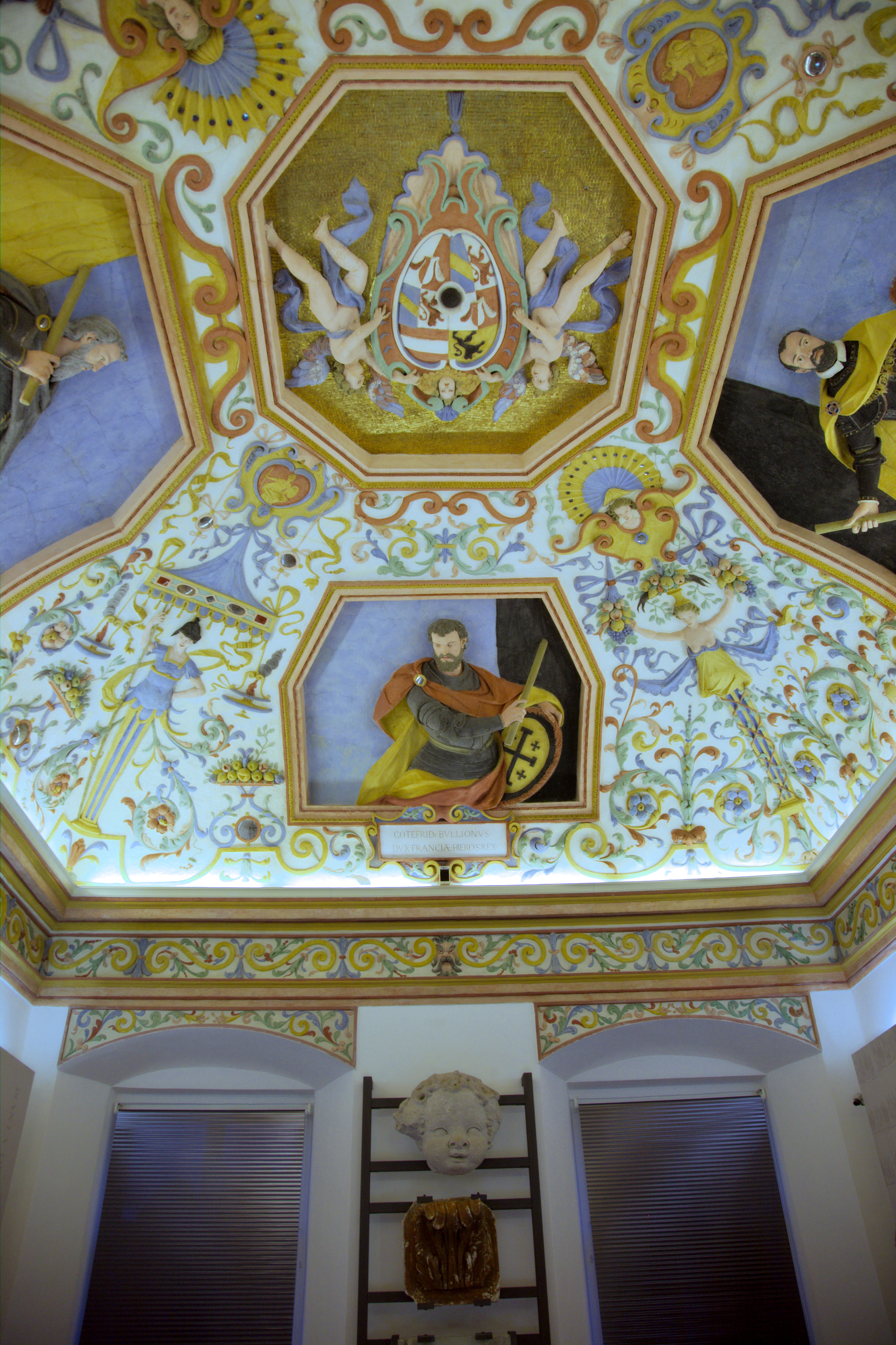 Neue Residenz Salzburg Feldherrnsaal